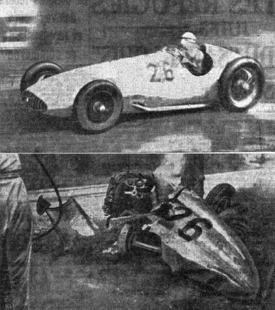 La mort de Richard Seaman, en 1939.